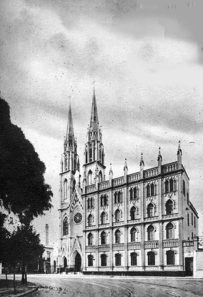 Vista de la Iglesia del Inmaculado Corazón de María en Buenos Aires. Frente a la Plaza Constitución.